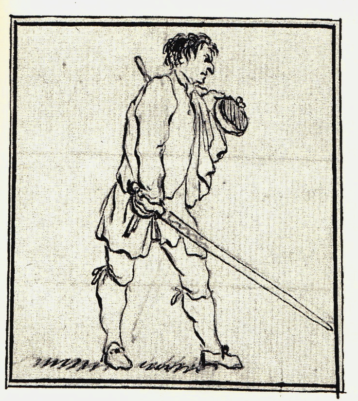 Набросок, сделанный неизвестным автором во время якобитского восстания 1745 года в Шотландии, в г. Пеникуик.